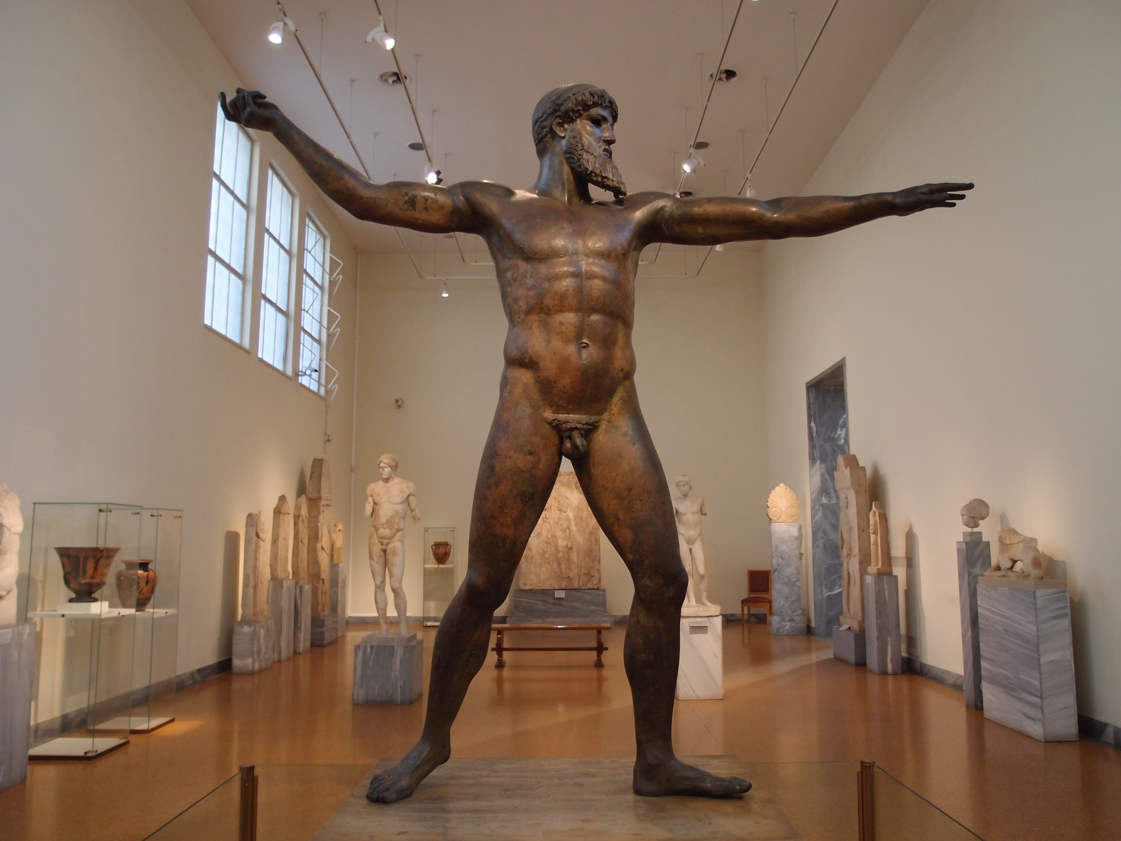 有名なポセイドーンの青銅像（雷霆を投げるゼウス像だとする説もある）